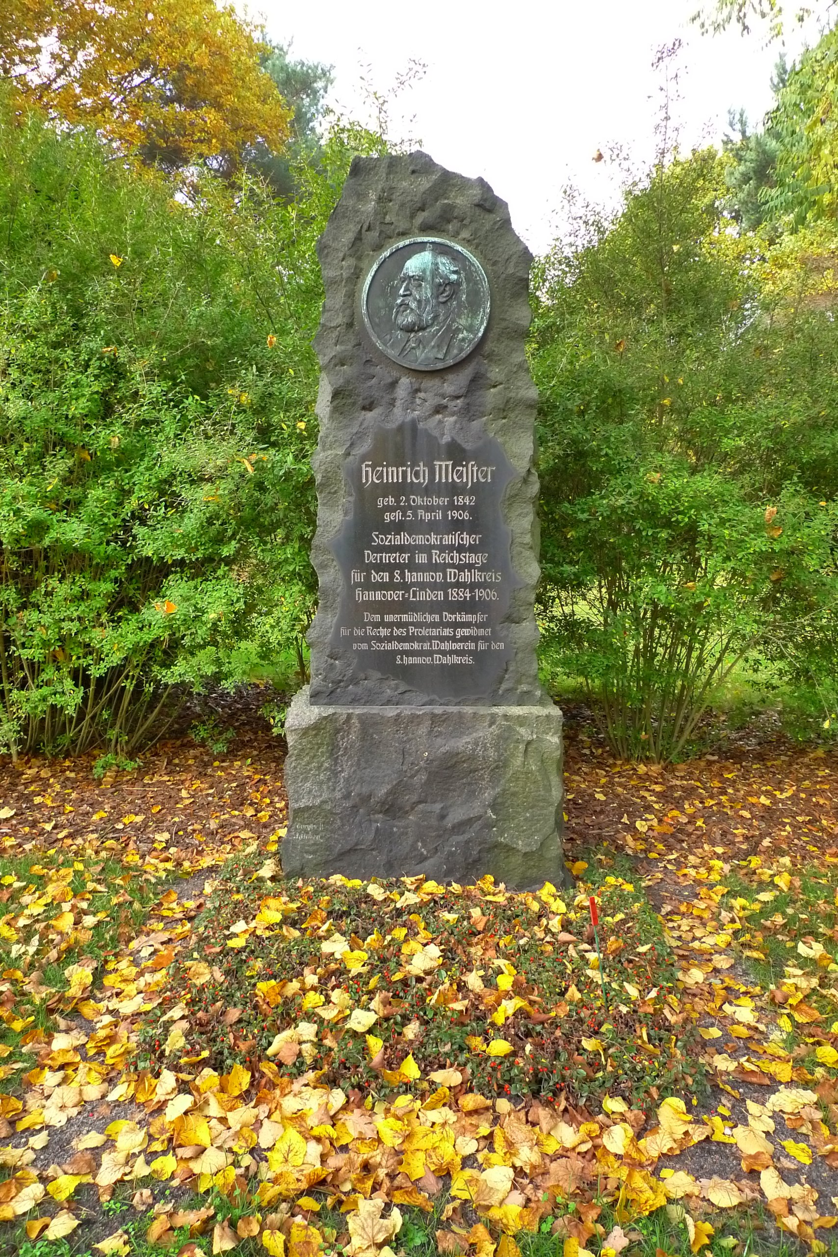 Grab von Heinrich Meister auf dem Stöckener Friedhof in Hannover